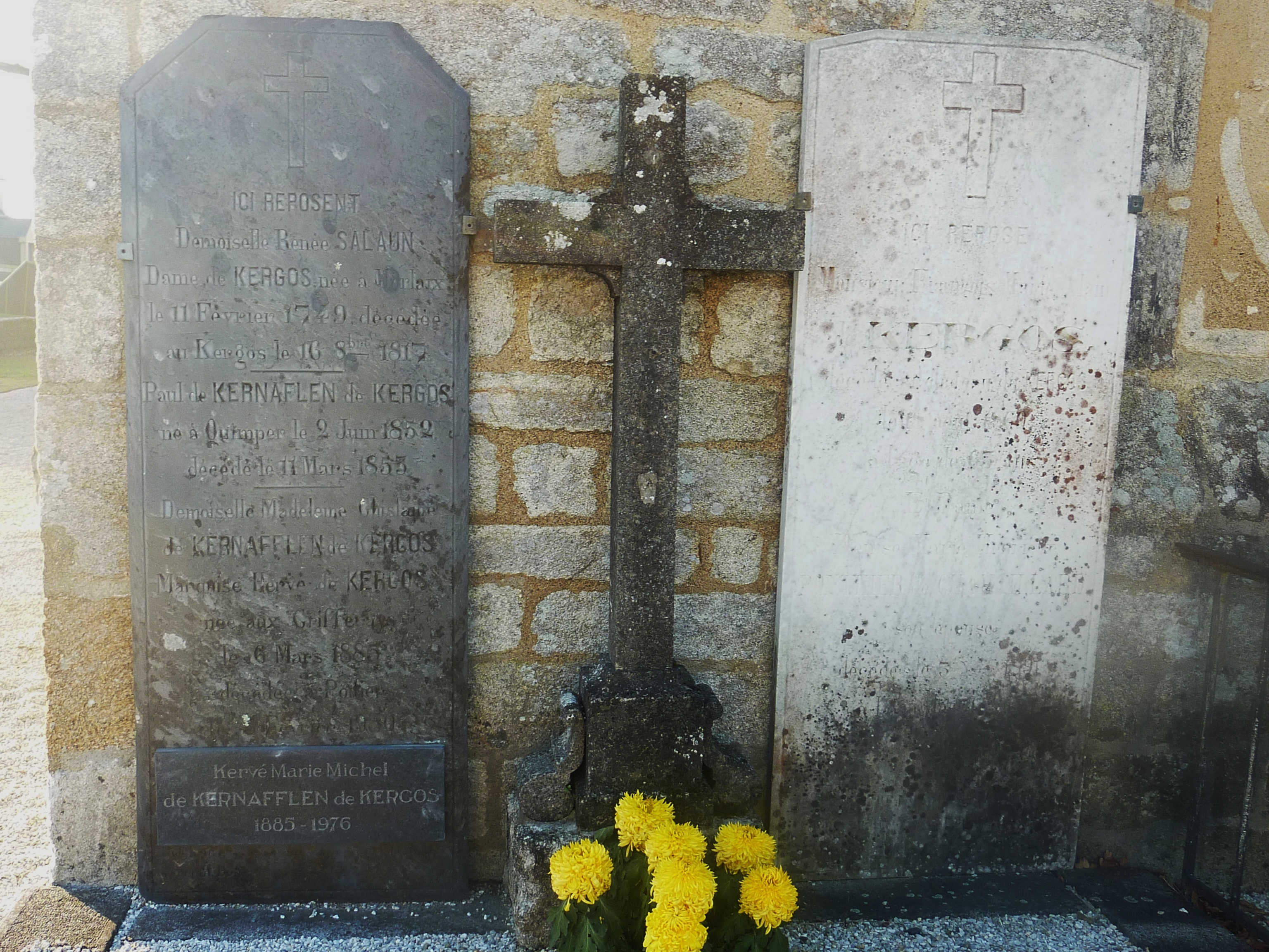 Pierres tombales de la famille De Kernafflen de Kergos dans l'ancien cimetière du placître de l'église de Clohars-Fouesnant